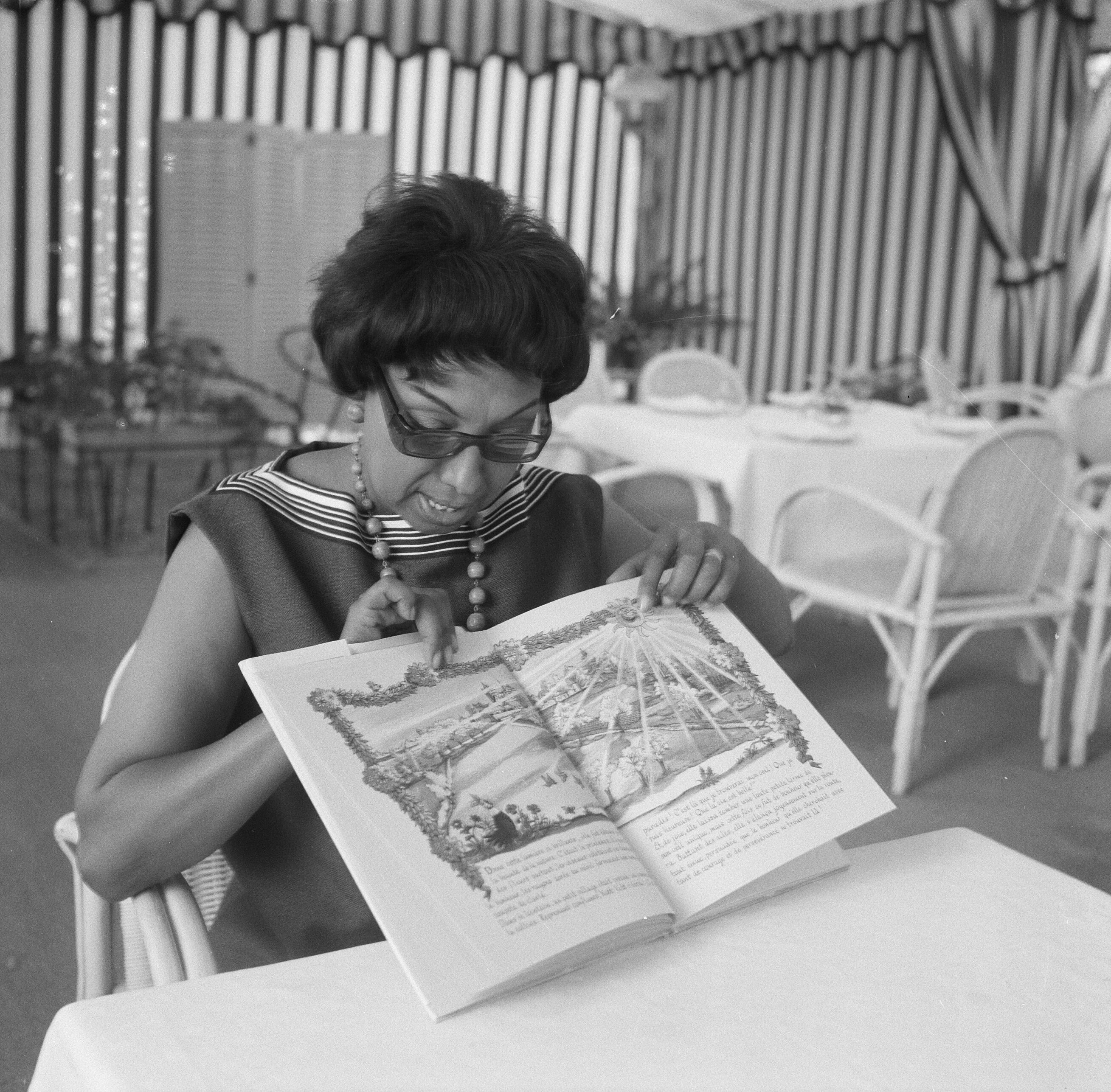 Collectie / Archief : Fotocollectie Anefo Reportage / Serie : [ onbekend ] Beschrijving : Josephine Baker in Kasteel Les Milandes J. B. met boek Regenboog-kinderen (1957) van Piet Worm Datum : 26 juni 1961 Locatie : Frankrijk Trefwoorden : boeken, kastelen Persoonsnaam : Baker, Josephine Fotograaf : Nijs, Jac. de / Anefo Auteursrechthebbende : Nationaal Archief Materiaalsoort : Negatief (zwart/wit) Nummer archiefinventaris : bekijk toegang 2.24.01.03 Bestanddeelnummer : 912-6484